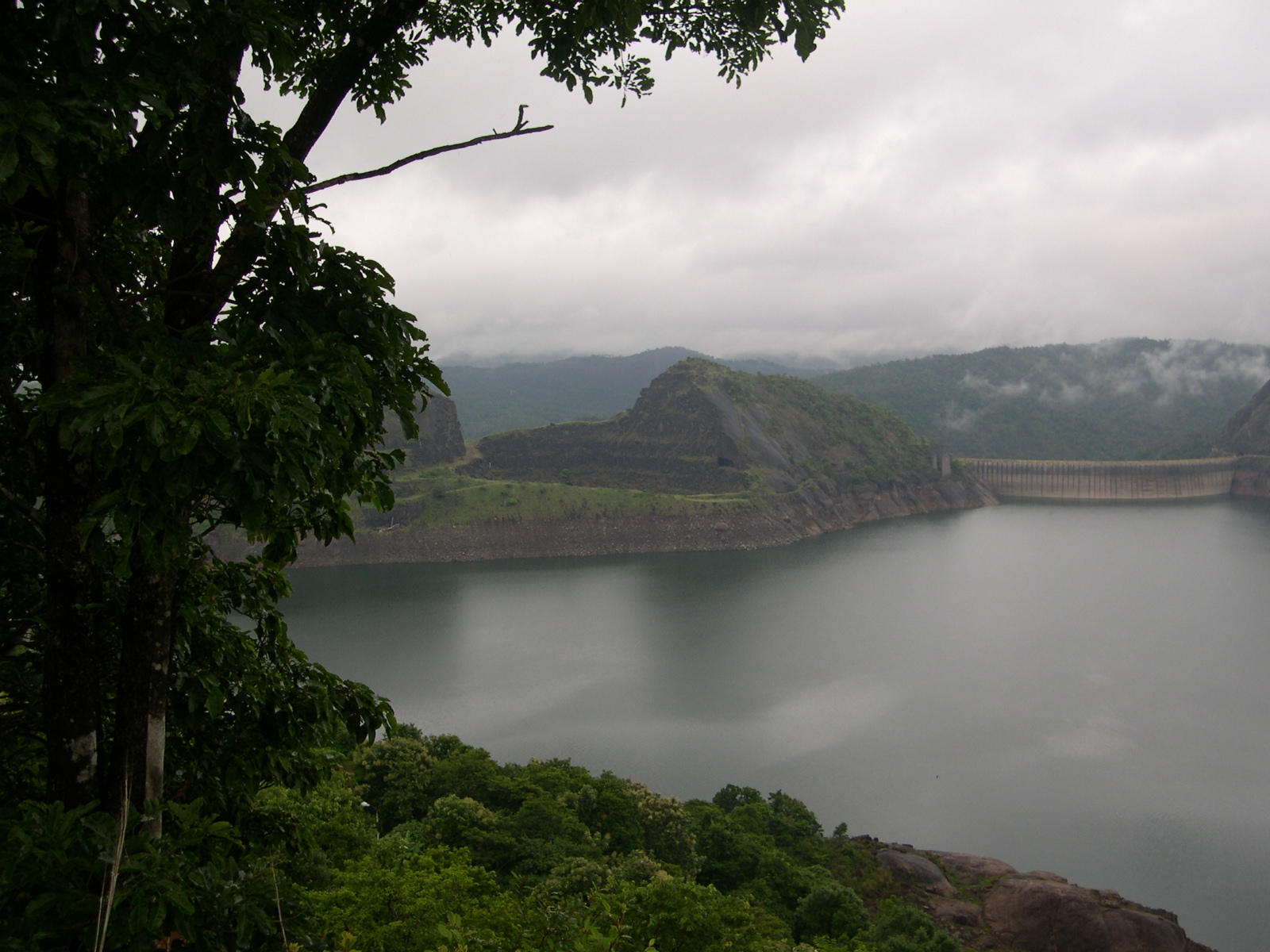 View Idukki Dam